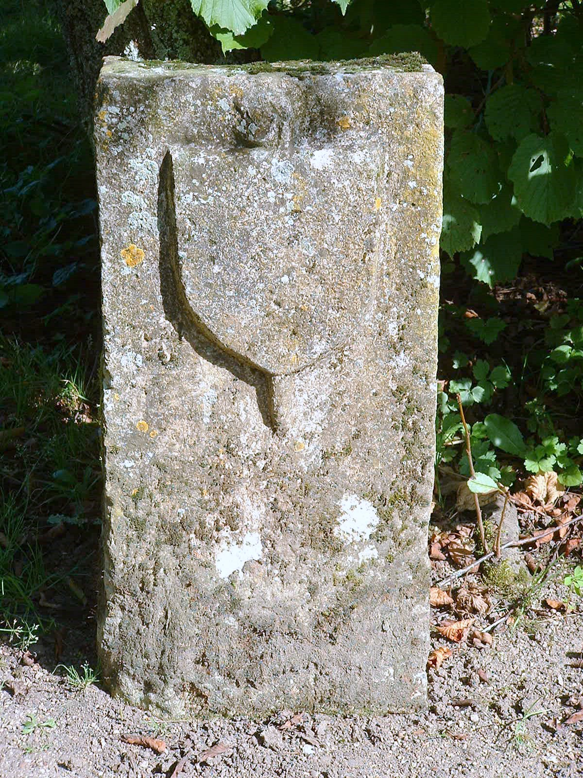 Châtel-Gérard (Yonne) - Prieuré de Vausse : borne